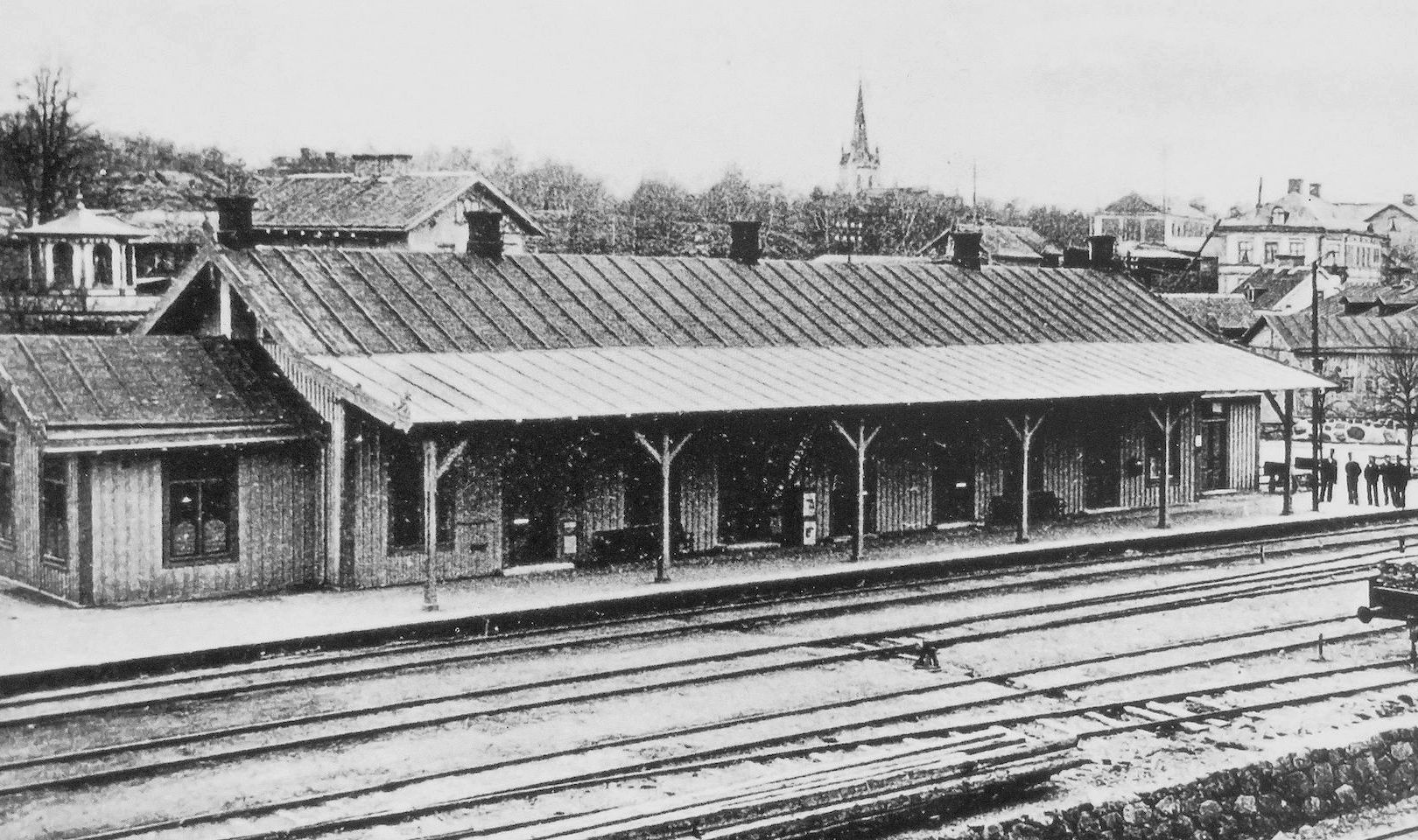 Oskarshamns ursprungliga stationshus i trä